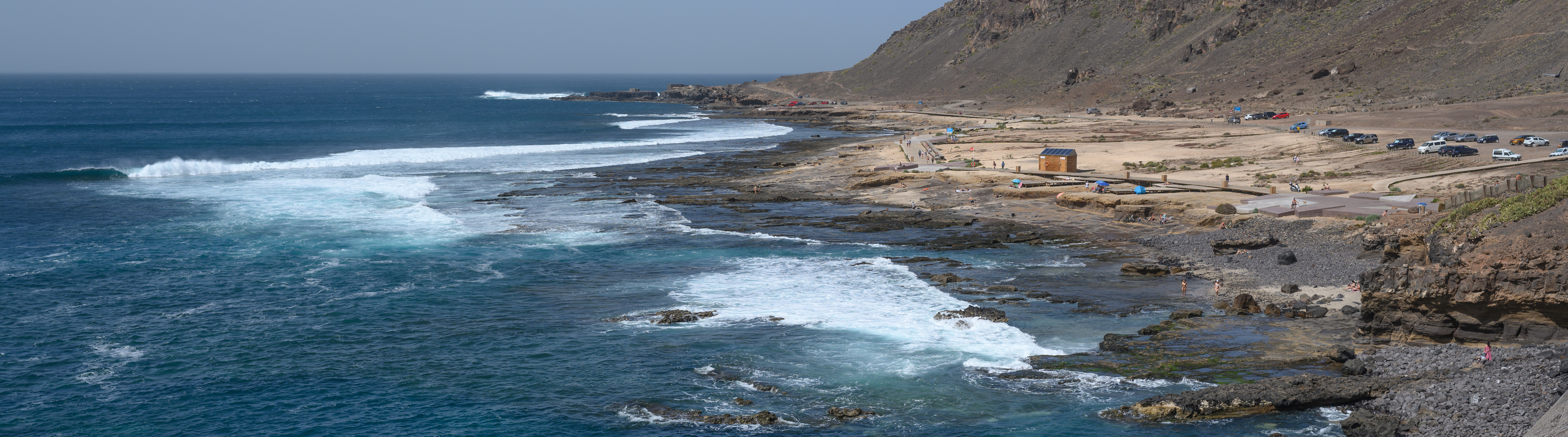 Playa Confital, Las Palmas, Gran Canaria, February 2019